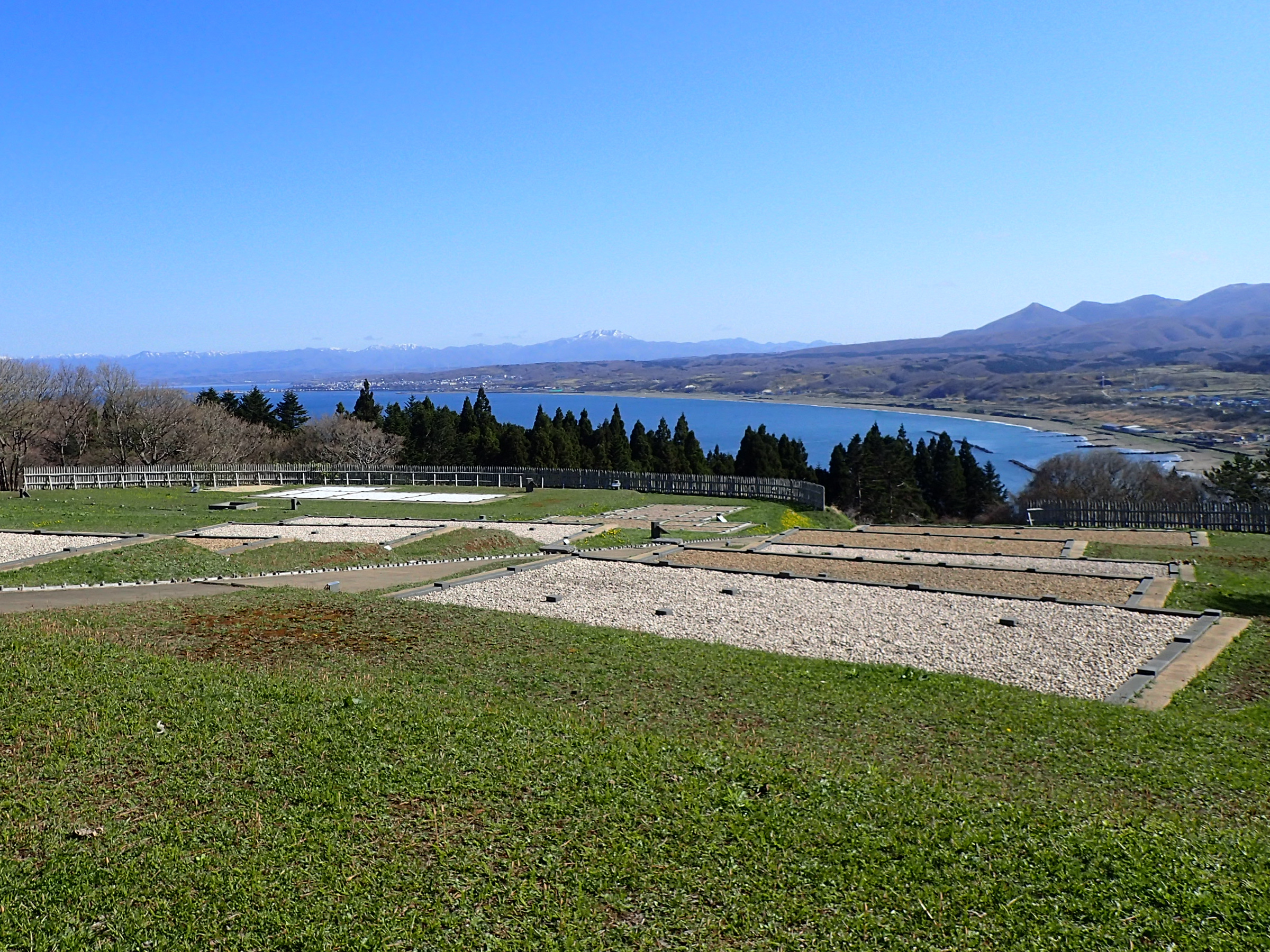 上ノ国勝山館の写真